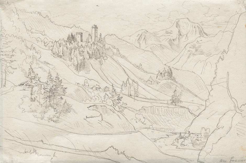 Adrian Ludwig Richter: Ansicht der Burgruine Straßberg bei Gossensass am Brenner, Bleistiftzeichnung 12,3 x 18,6 cm